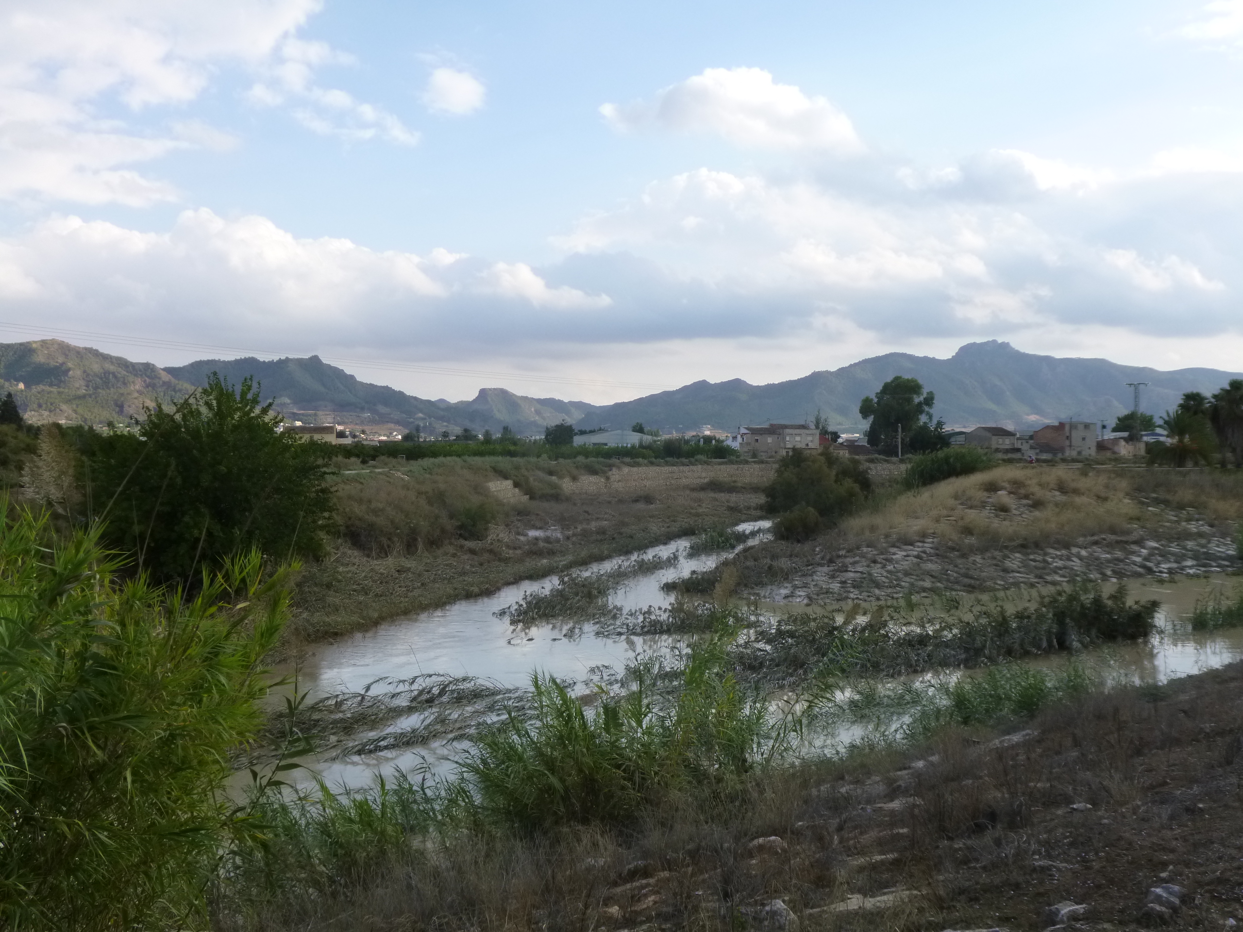 Confluencia de los ríos Segura y Guadalentín, frente a la localidad de Beniaján.